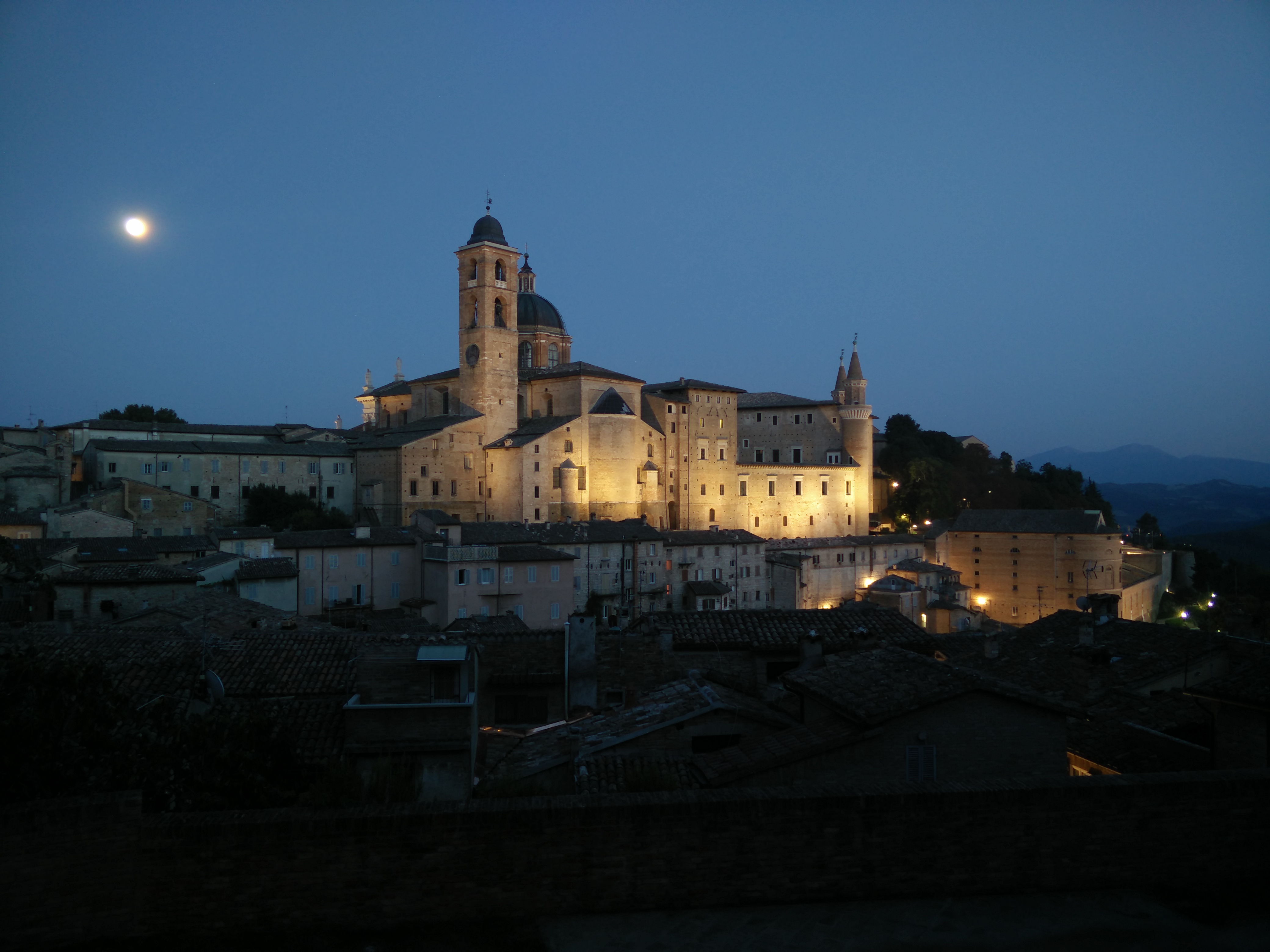 Palazzo Ducale di Urbino - Galleria Nazionale delle Marche - MIBAC This is a photo of a monument which is part of cultural heritage of Italy.